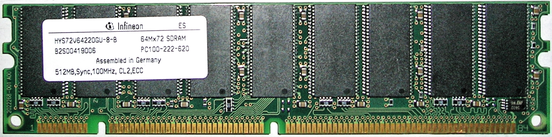 Infineon C100-222-620 DIMM 512MB SDRAM